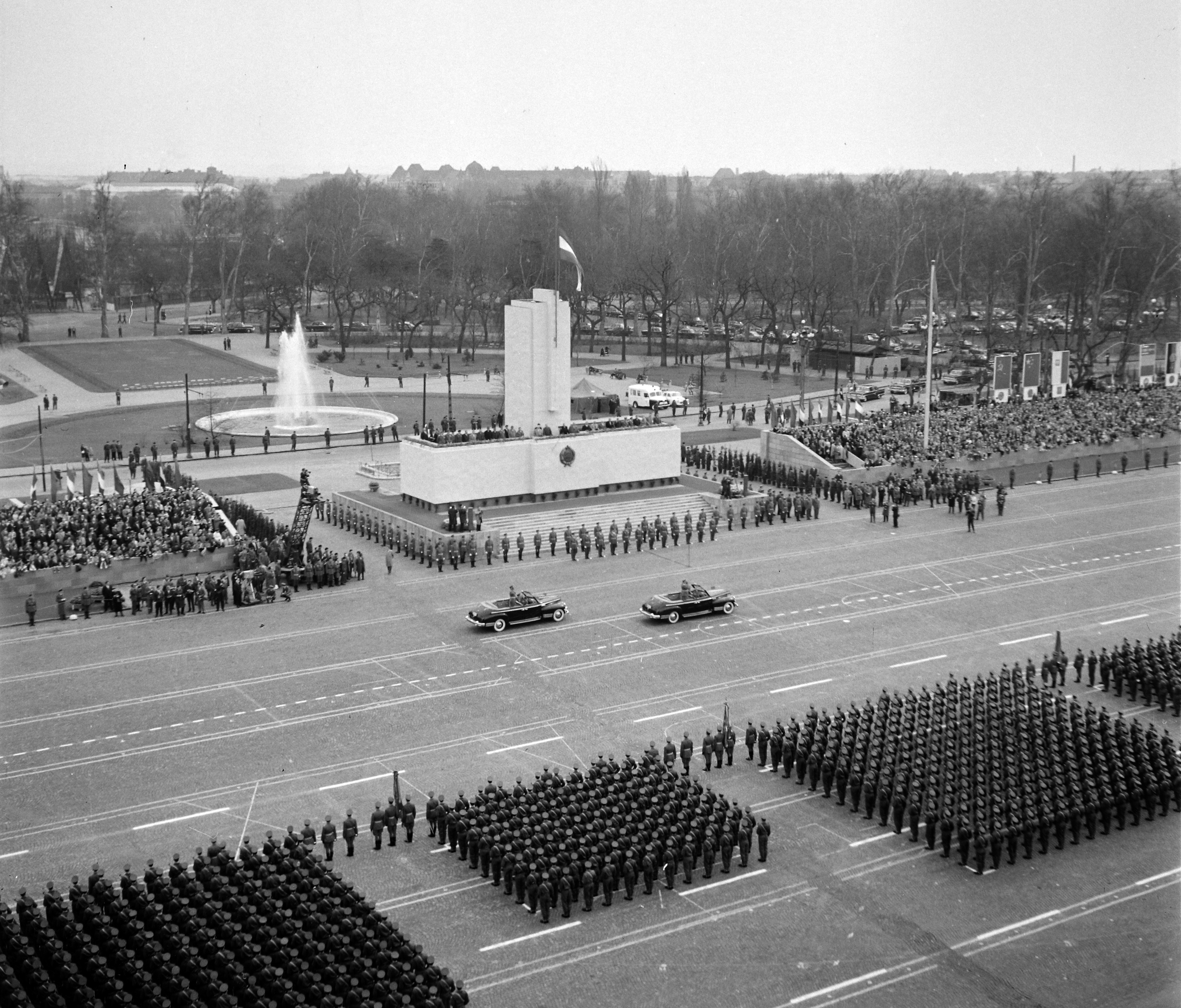 Ötvenhatosok tere (Felvonulási tér), április 4-i katonai díszszemle. Location: Hungary, Budapest XIV. Tags: march, parade, fountain, April 4 celebration, Budapest Title: Ötvenhatosok tere (Felvonulási tér), április 4-i katonai díszszemle, 1964 Budapest